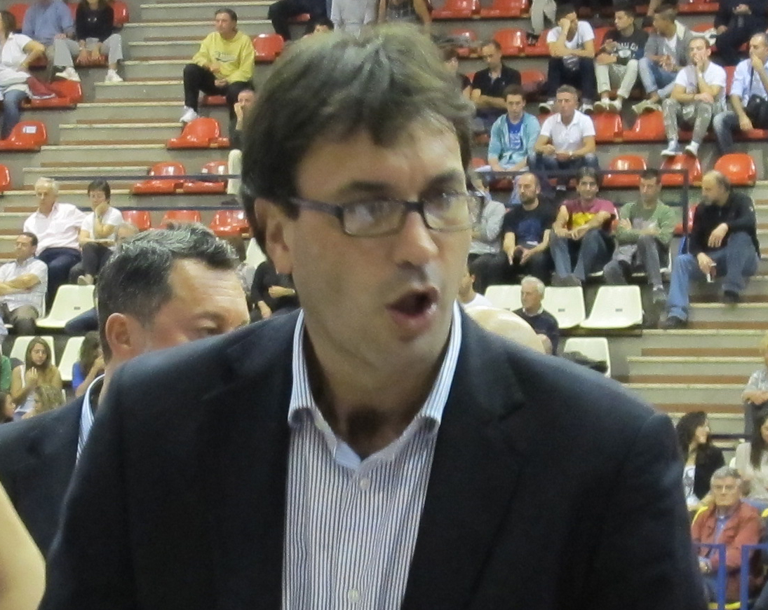 Timeout di Fabrizio Ambrassa, coach del Basket Rimini Crabs, nell'incontro interno contro Castelfiorentino.